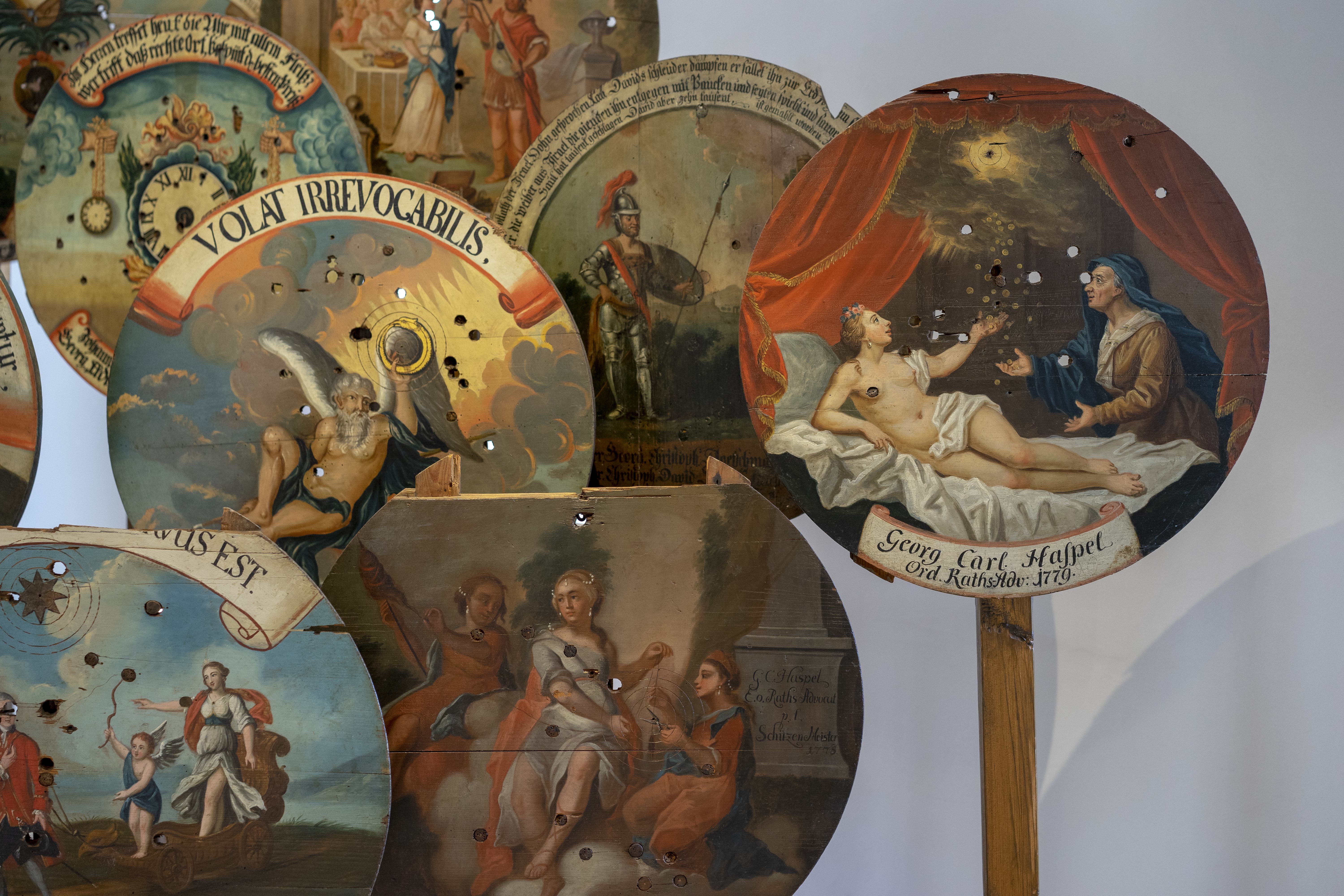 Hällisch-Fränkisches Museum in Schwäbisch Hall: Ausschnitt aus einer Austellung historischer Schützenscheiben, u.a. mit eine Darstellung des Danaë-Mythos (ganz rechts). Hinweis: Bei dem Museumsbesuch, bei dem diese Aufnahme gemacht wurde, konnte ich nirgendwo einen Hinweis auf ein generelles Fotografierverbot entdecken. Daher gehe ich davon aus, dass einer Veröffentlichung dieser Aufnahme auf Commons nichts entgegensteht. Selbstverständlich habe ich die Aufnahme ohne Blitz und ohne Stativ gemacht, um andere Besucher nicht zu stören. Dies führt natürlich zu einer begrenzten Bildqualität, die ich zu entschuldigen bitte.